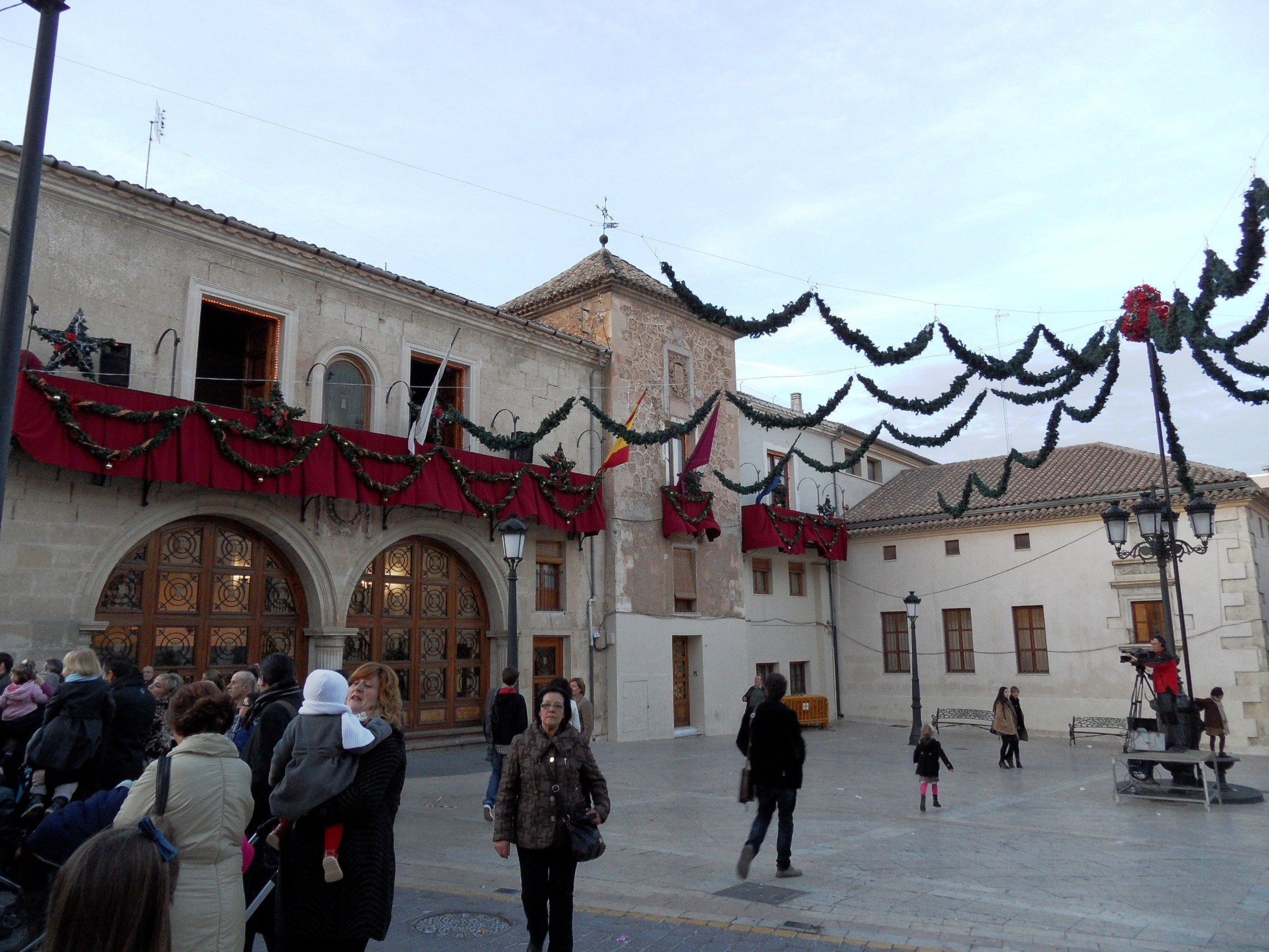 Ayuntamiento; antiguo concejo, torre y palacio de los Alarcos.